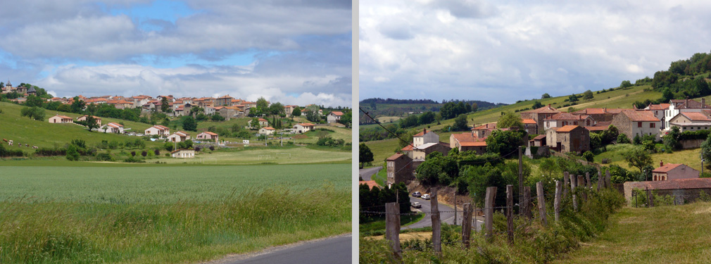 Vue générale de Moriat